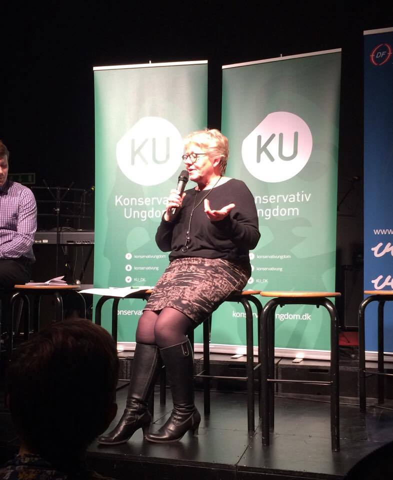 Lene Kjelgaard (februar 2017) Bjerget Efterskole